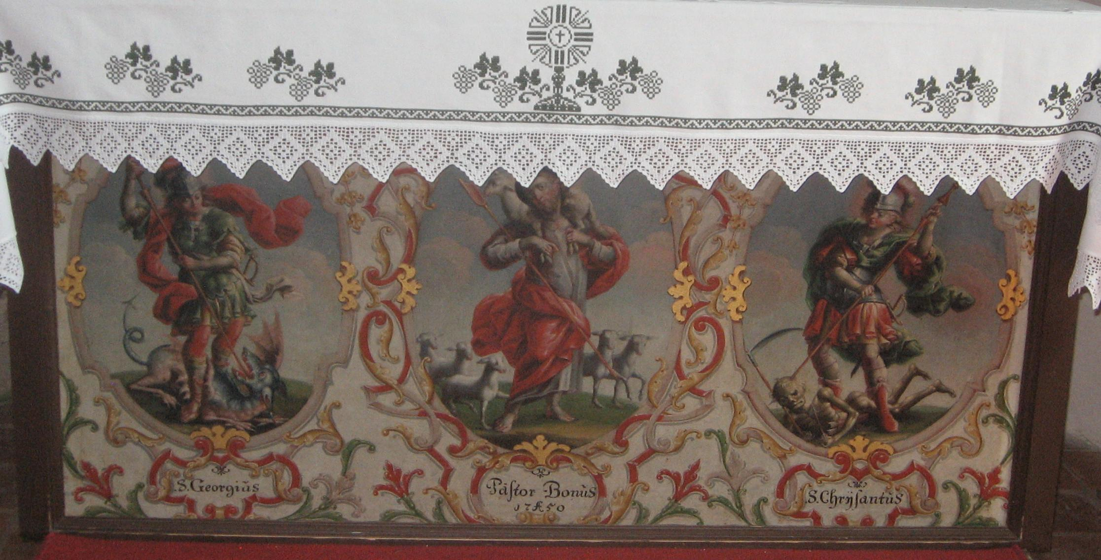 Antependium inside Saint George church on Danielsberg, about 1750.